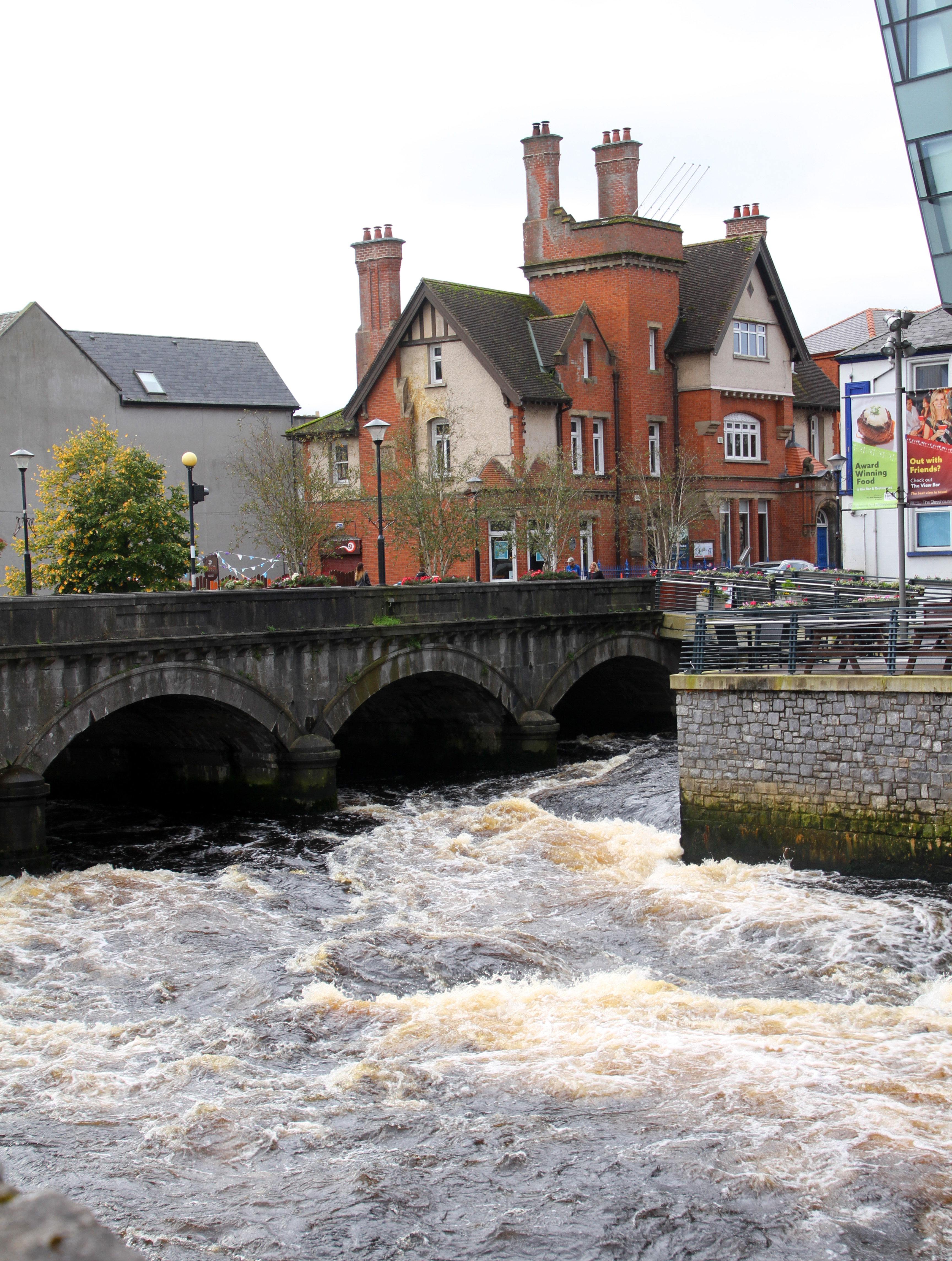 Sligo in Irland